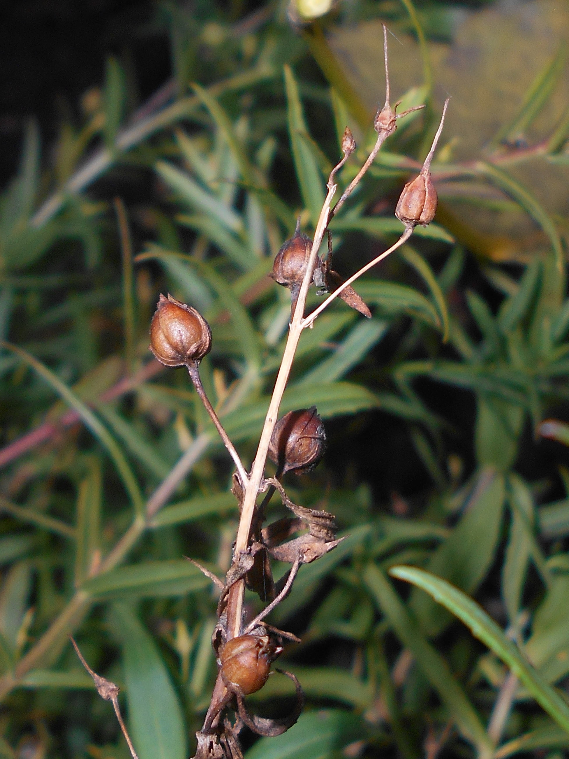 Konitrut błotny (Gratiola officinalis), Ogród Botaniczny Uniwersytetu Wrocławskiego.